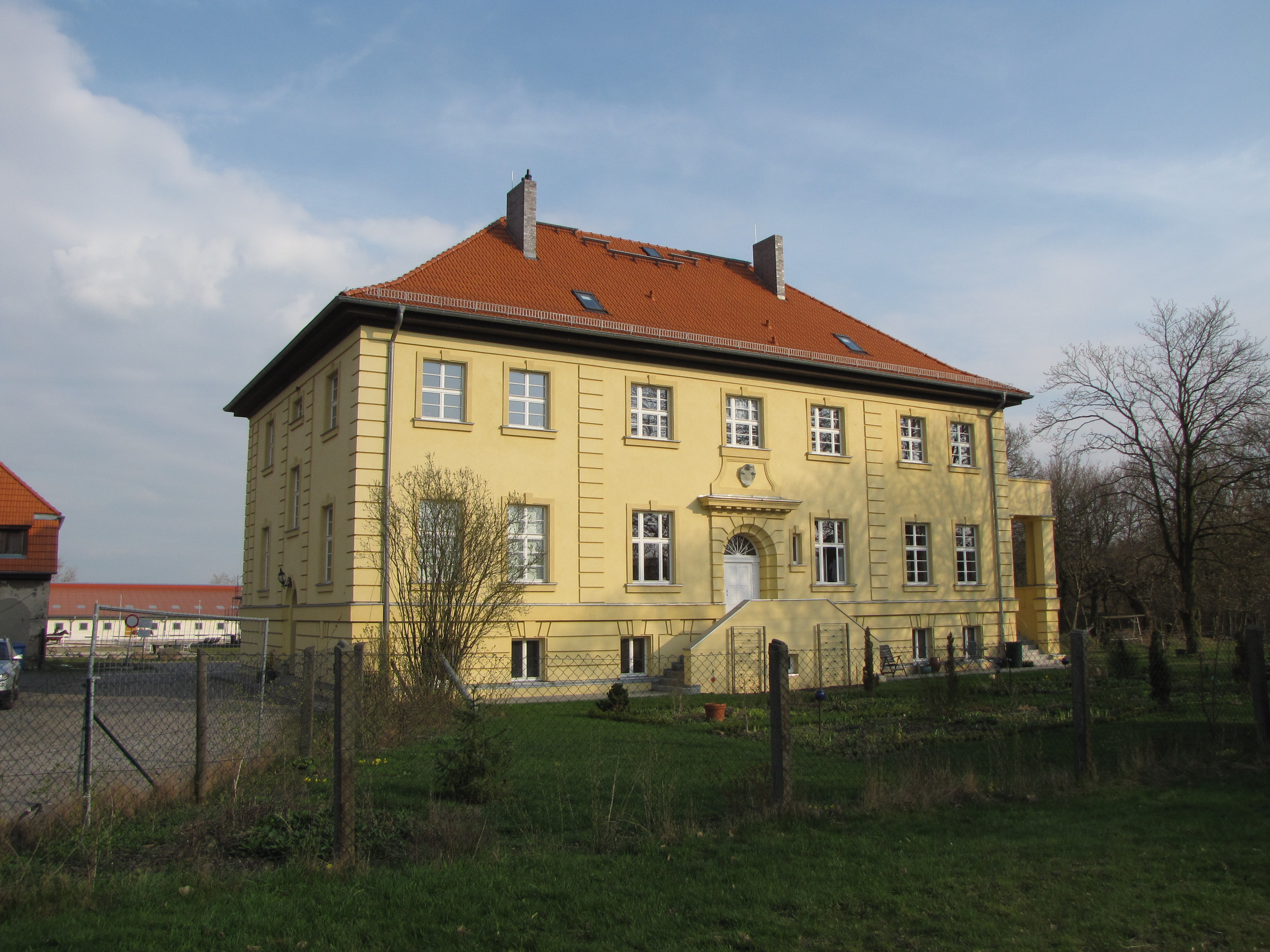 Gutshaus Boddinsfelde, Landkreis Dahme-Spreewald, Brandenburg, Deutschland, erbaut zwischen 1907 und 1910.